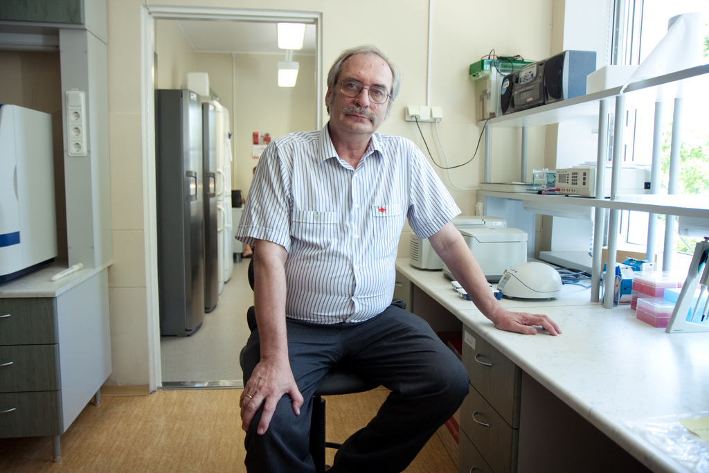 Kalandusteadlane Tiit Paaver 2011. aastal.